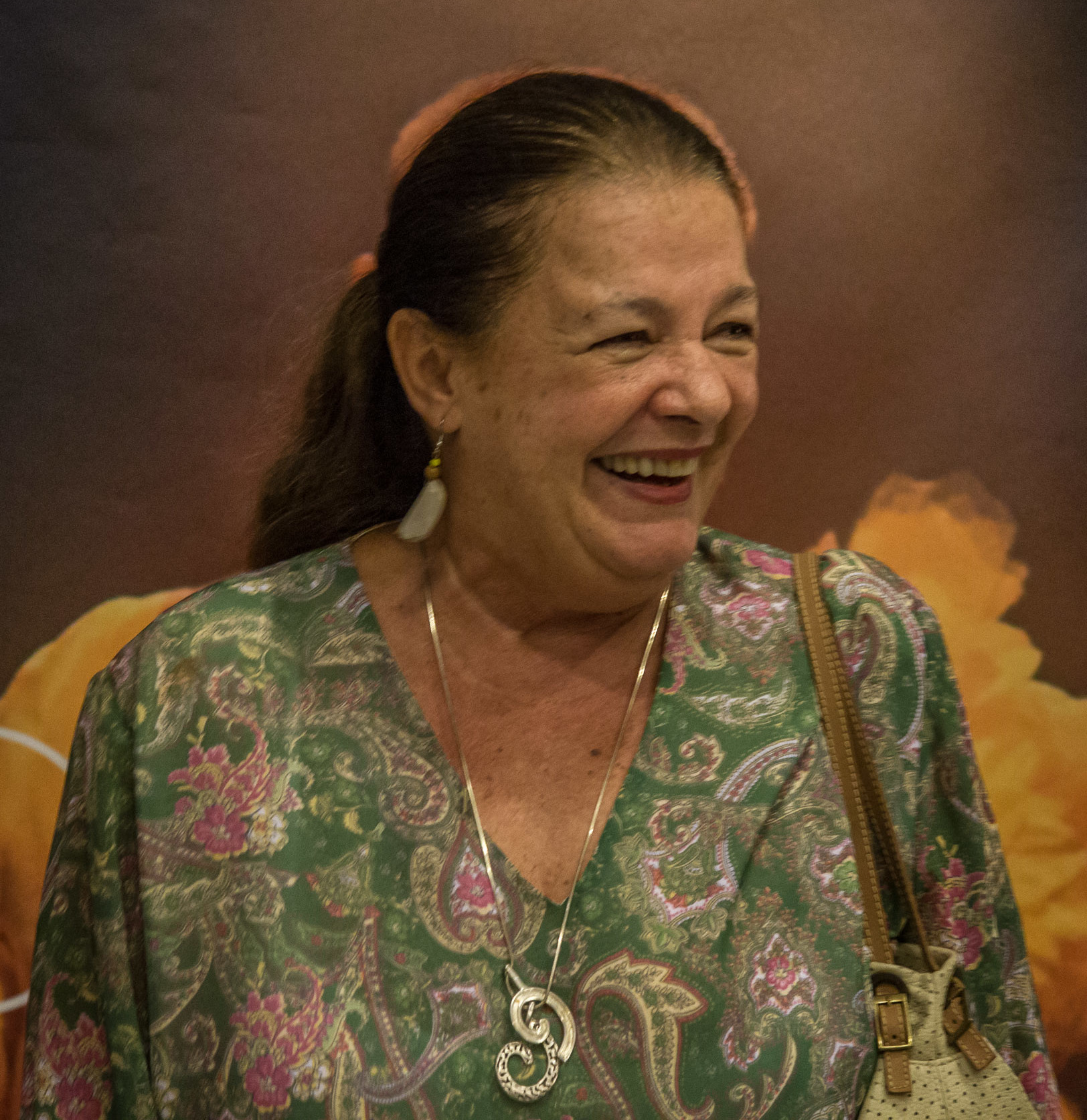 Beth Mendes na pré-estreia do filme Divinas Divas de Leandra Leal em 2017.